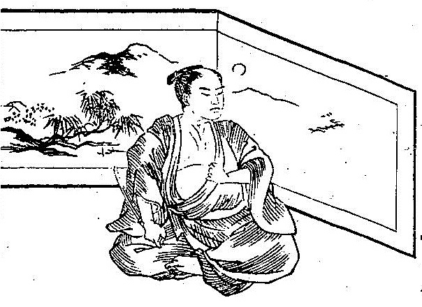 益田右衛門介